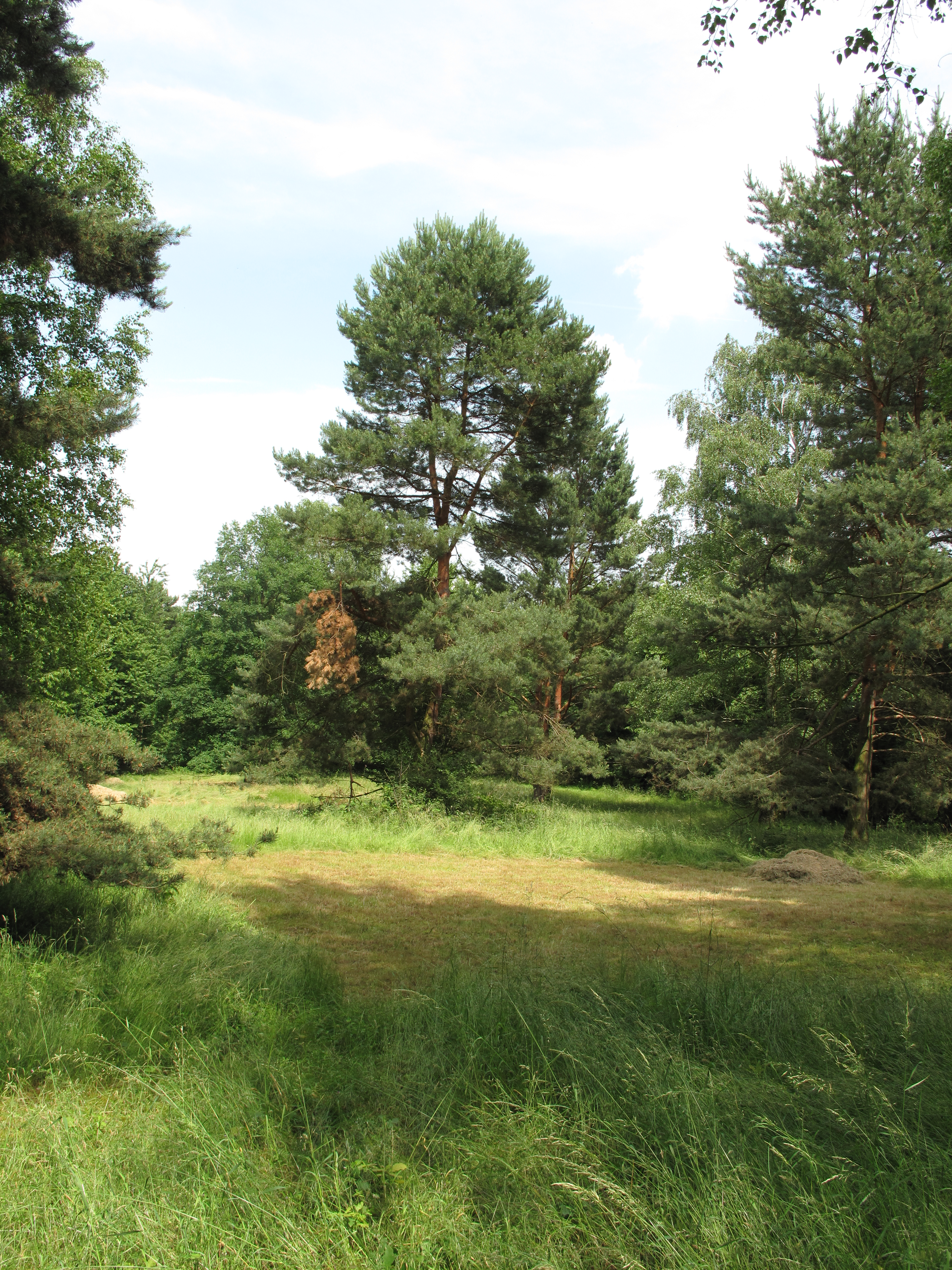 Přírodní rezervace Lhotecké stráně. Okres Kutná Hora, Česká republika.